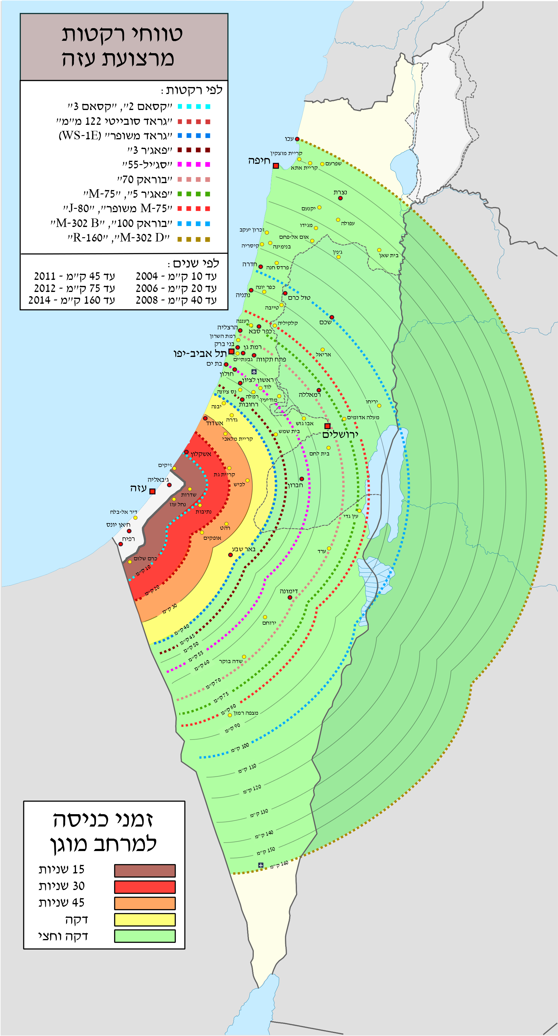 טווח ירי רקטות על ישראל מרצועת עזה 10-160 ק"מ. יישובים בטווח ה-10 ק"מ: שדרות. יישובים בטווח ה-20 ק"מ: נתיבות, אשקלון. יישובים בטווח ה-30 ק"מ: אופקים, רהט, לכיש, אשדוד, קריית גת, קריית מלאכי. יישובים בטווח ה-40 ק"מ: באר שבע, יבנה. יישובים בטווח ה-45 ק"מ: רחובות. יישובים בטווח ה-50 ק"מ: בית שמש, נס ציונה. יישובים בטווח ה-60 ק"מ: ראשון לציון, חולון, בת ים, רמלה, לוד, מודיעין-מכבים-רעות, חברון יישובים בטווח ה-70 ק"מ: ירושלים, תל אביב-יפו, רמת גן, פתח תקווה, רמת השרון, בני ברק, דימונה, ירוחם, שדה בוקר, בית לחם. יישובים בטווח ה-75 ק"מ: הרצליה, רעננה, רמאללה, ערד. יישובים בטווח ה-80 ק"מ: כפר סבא, מעלה אדומים, עין גדי. יישובים בטווח ה-90 ק"מ: אריאל, מצפה רמון. יישובים בטווח ה-100 ק"מ: נתניה, טייבה, טול כרם, יריחו. יישובים בטווח ה-110 ק"מ: חדרה, שכם. יישובים בטווח ה-120 ק"מ: זכרון יעקב, בנימינה, קיסריה. יישובים בטווח ה-130 ק"מ: ג'נין, אום אל פחם. יישובים בטווח ה-140 ק"מ: עפולה, מגידו, יקנעם. יישובים בטווח ה-150 ק"מ: חיפה, נצרת, בית שאן. יישובים בטווח ה-160 ק"מ: קריית אתא, קריית מוצקין, שפרעם.